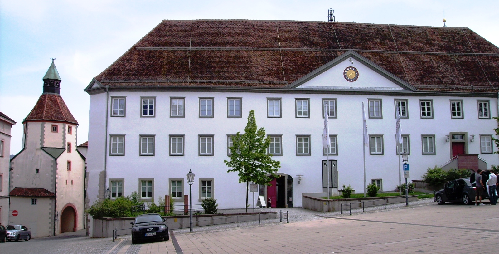 Lichtbilder von Hechingen